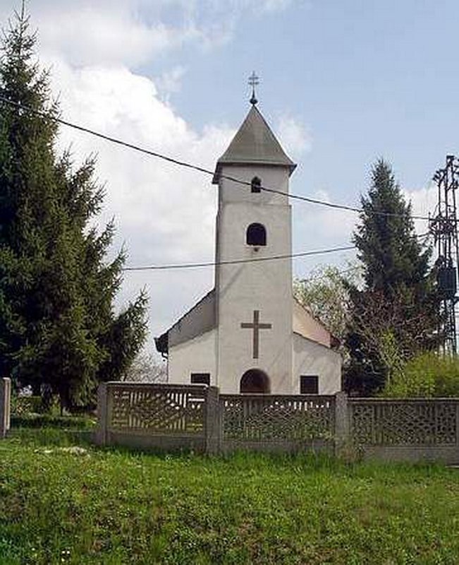 Dijaneš - Kapelica frontalno